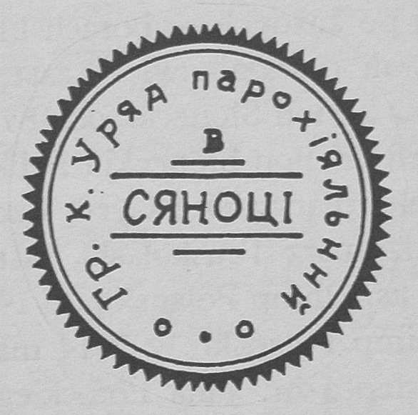 Pieczęć parafii greckokatolickiej pw. Przemienia Pańskiego w Sanoku (1911).